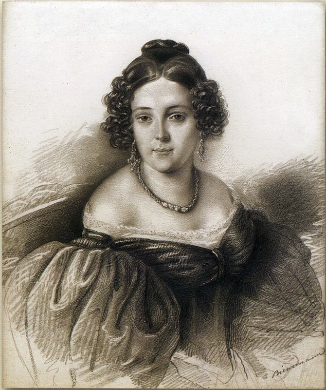 Н.Ф.Иванова. Рисунок В.Ф.Бинемана. 1840-е годы. ИРЛИ. В Лермонтовской энциклопедии (М., 1980) и в аннотации к рисунку Бинемана в ИРЛИ — 1830-е годы.